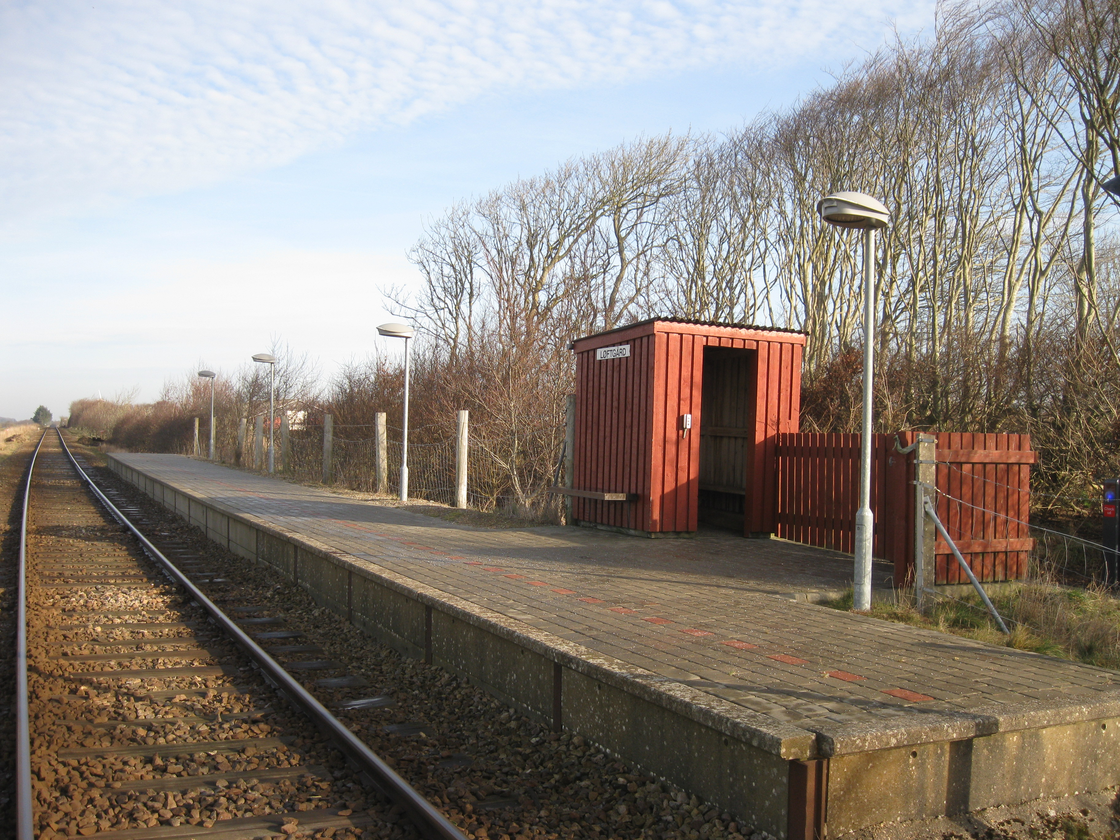 Løftgård Station på Vestbanen